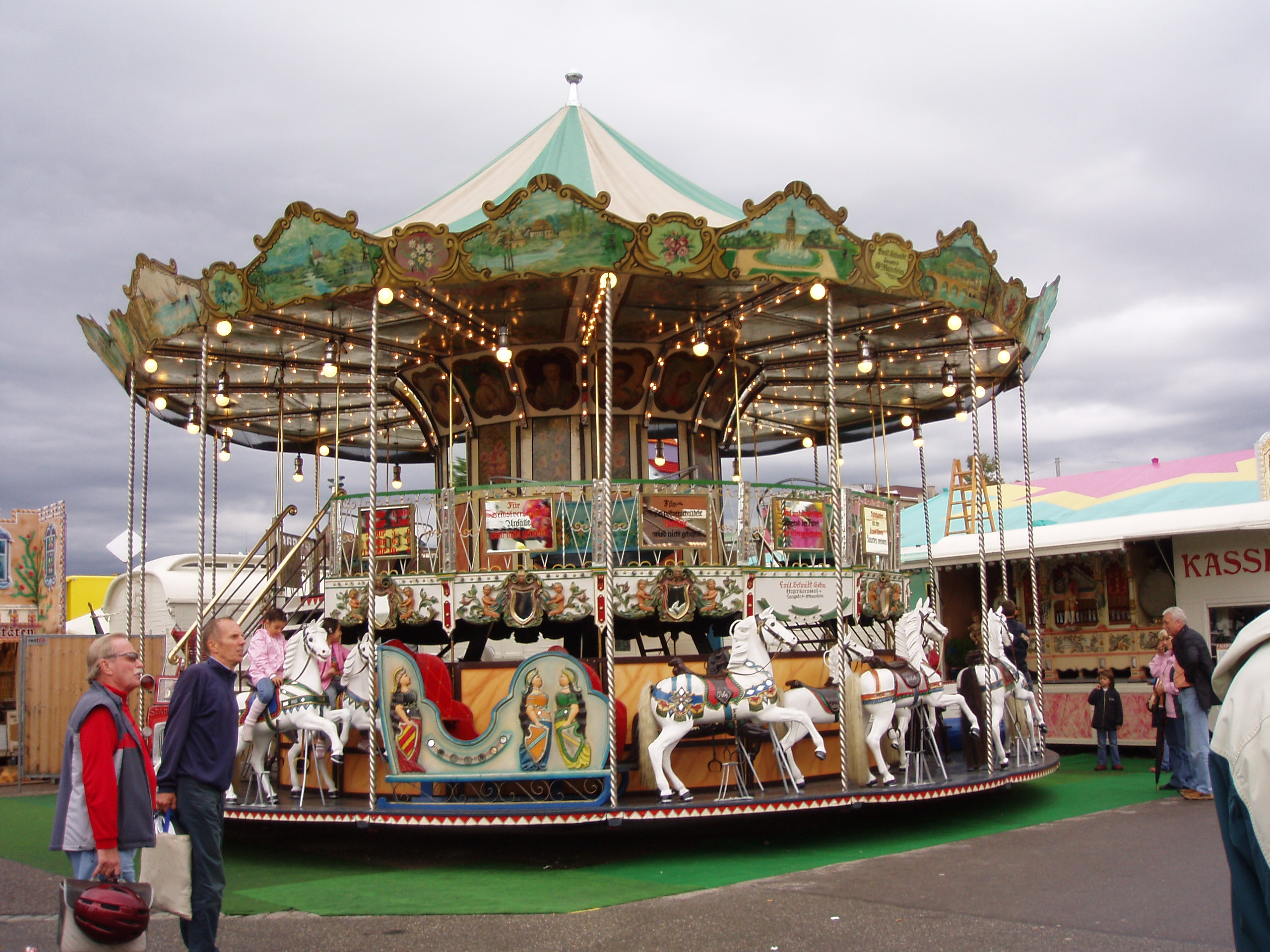 Etagenkarussell, Anfang des 20. Jh.